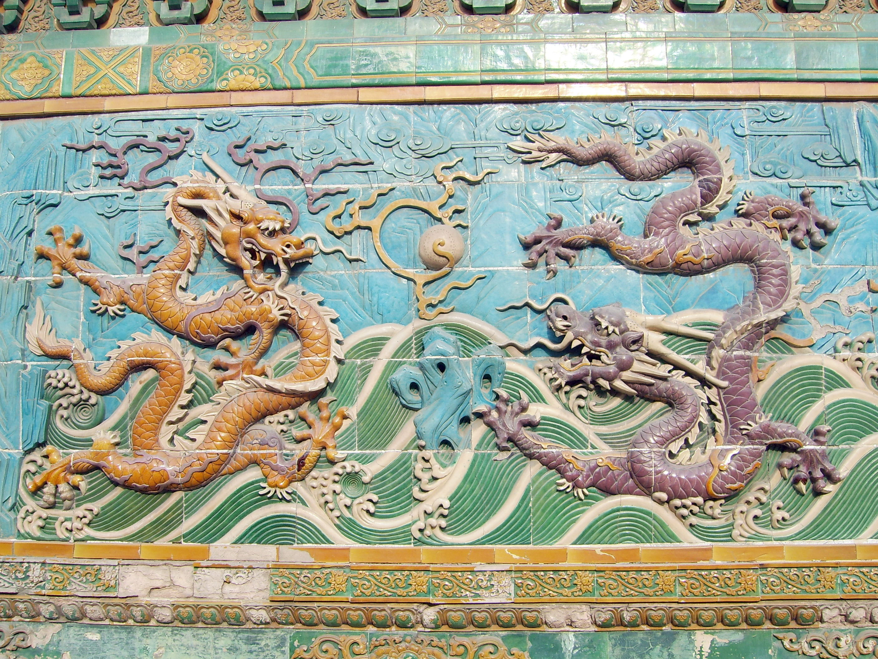 北海九龙壁之二,二龙戏珠